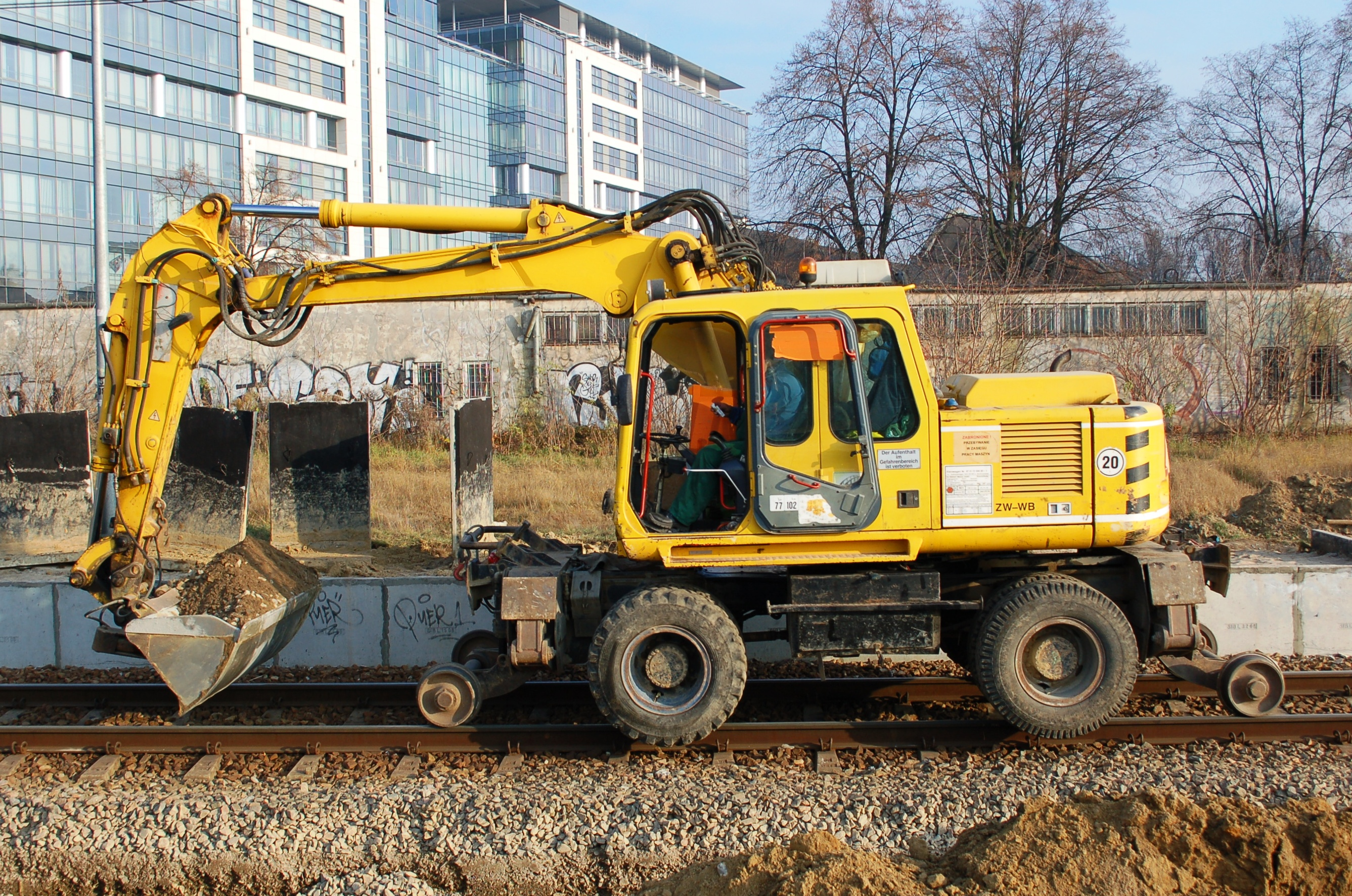 Marynarska-street, Warsaw